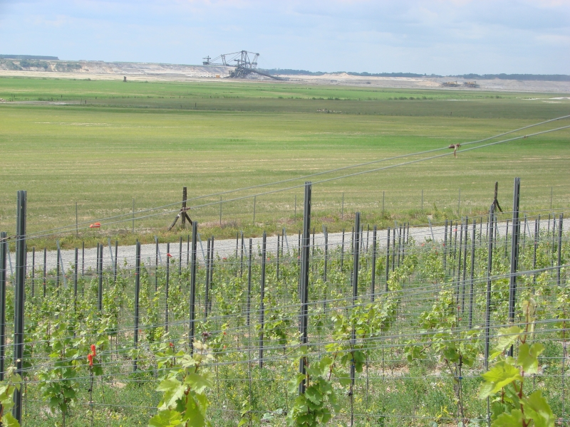 Aufnahme aus dem Jahr 2012, 2005 wurde der Weinberg angelegt